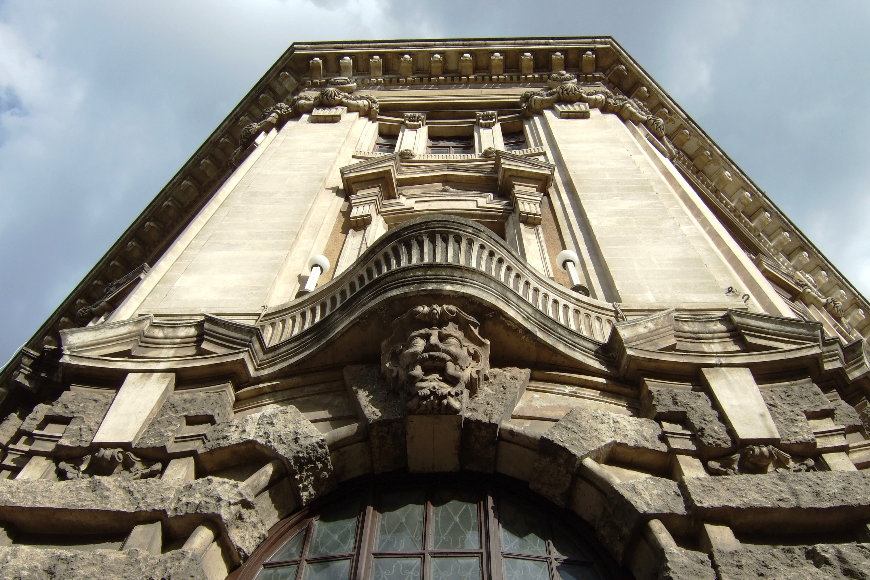 Ingresso su via sant'euplio del Palazzo delle Poste Centrali di Catania, progettato dall'architetto Francesco Fichera